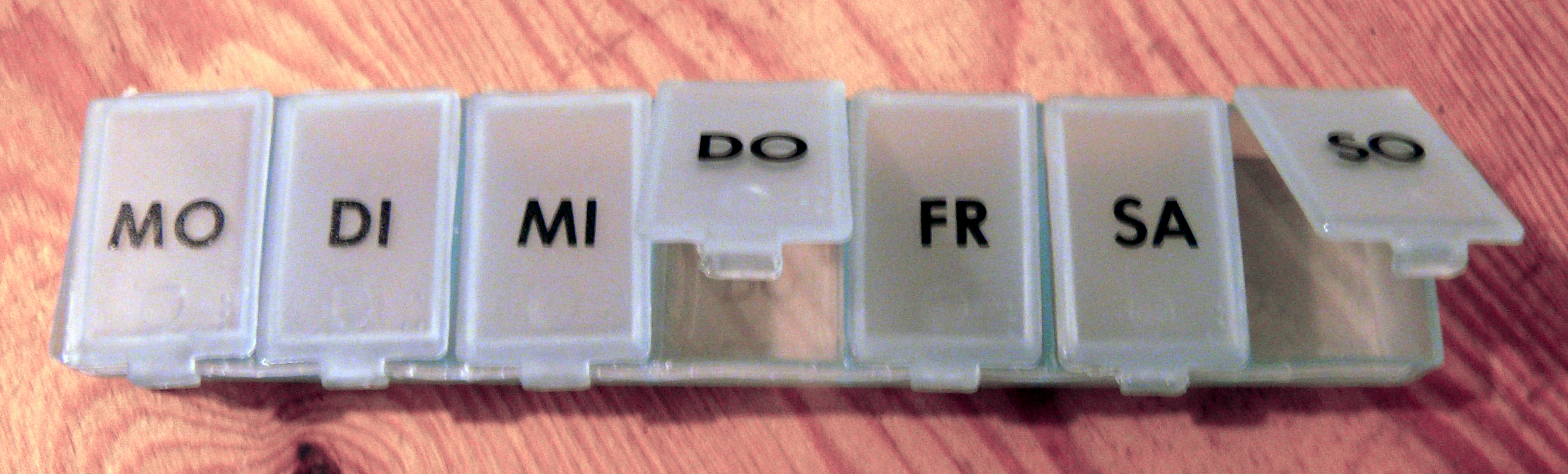 Bildinhalt: Pillenbox mit separaten beschrifteten Fächern für jeden Wochentag Aufnahmeort: Baden-Baden, Deutschland